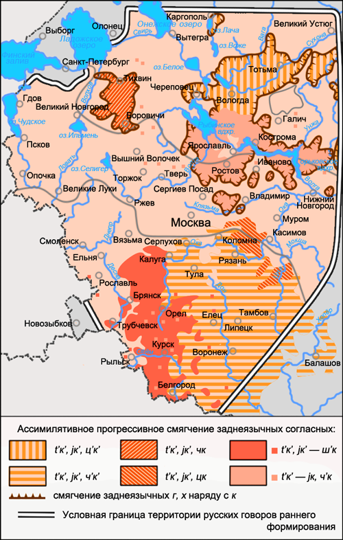 Карта распространения ассимилятивного прогрессивного смягчения заднеязычных к, г, х в русских говорах. Источники: Захарова К. Ф., Орлова В. Г., Сологуб А. И., Строганова Т. Ю. Образование севернорусского наречия и среднерусских говоров / Ответственный редактор В. Г. Орлова. — М.: «Наука», 1970. — С. 57 (Карта 11. Модели ассимилятивного прогрессивного смягчения задненёбных согласных).